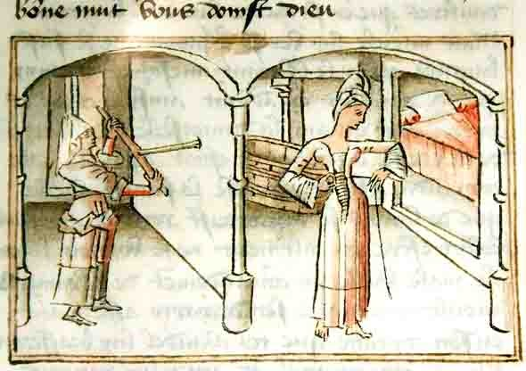 Euriant se dévêt pendant que sa servante Gondrée perce le mur avec une chignole.